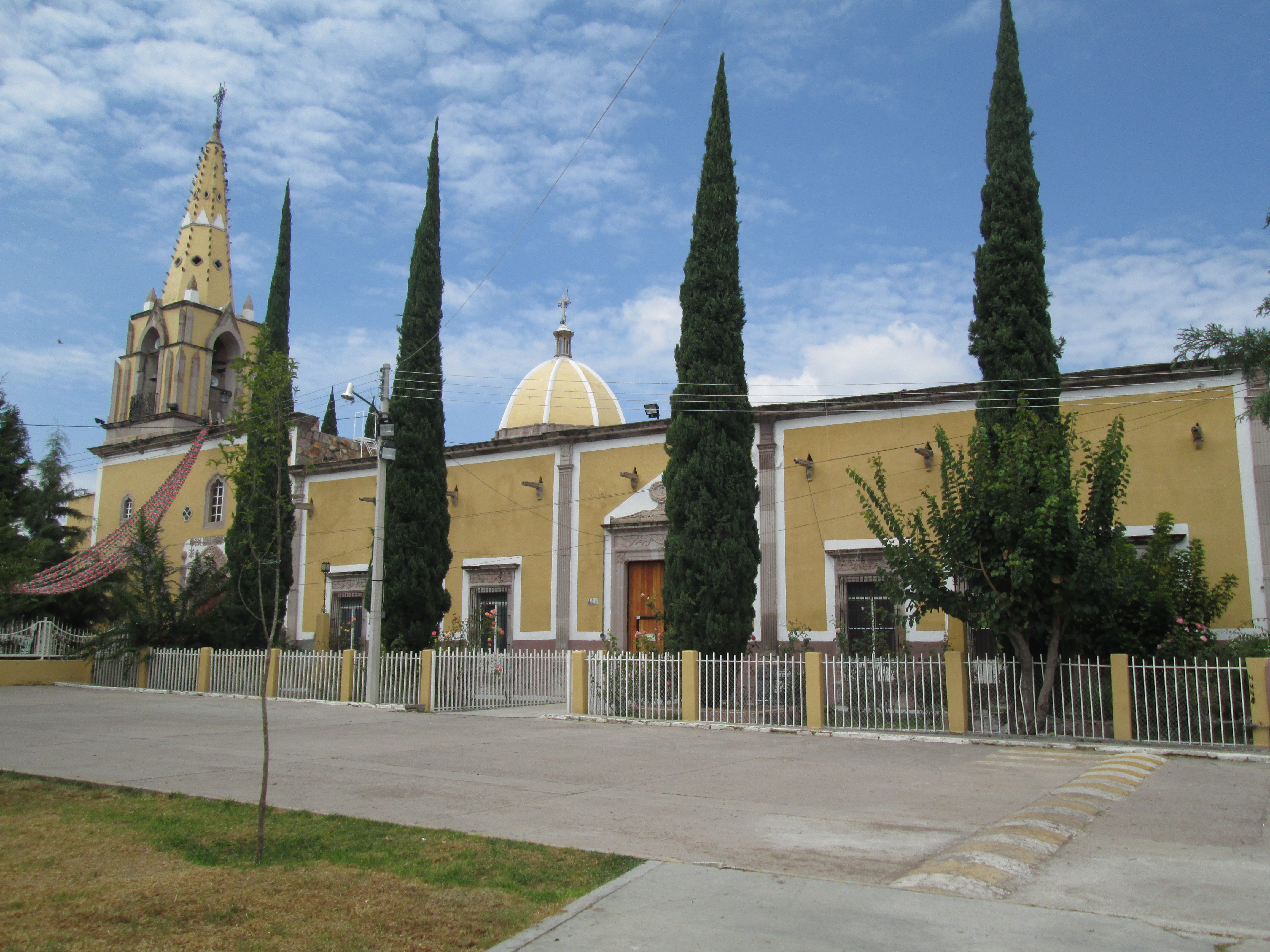 Vista frontal del templo y sacristía